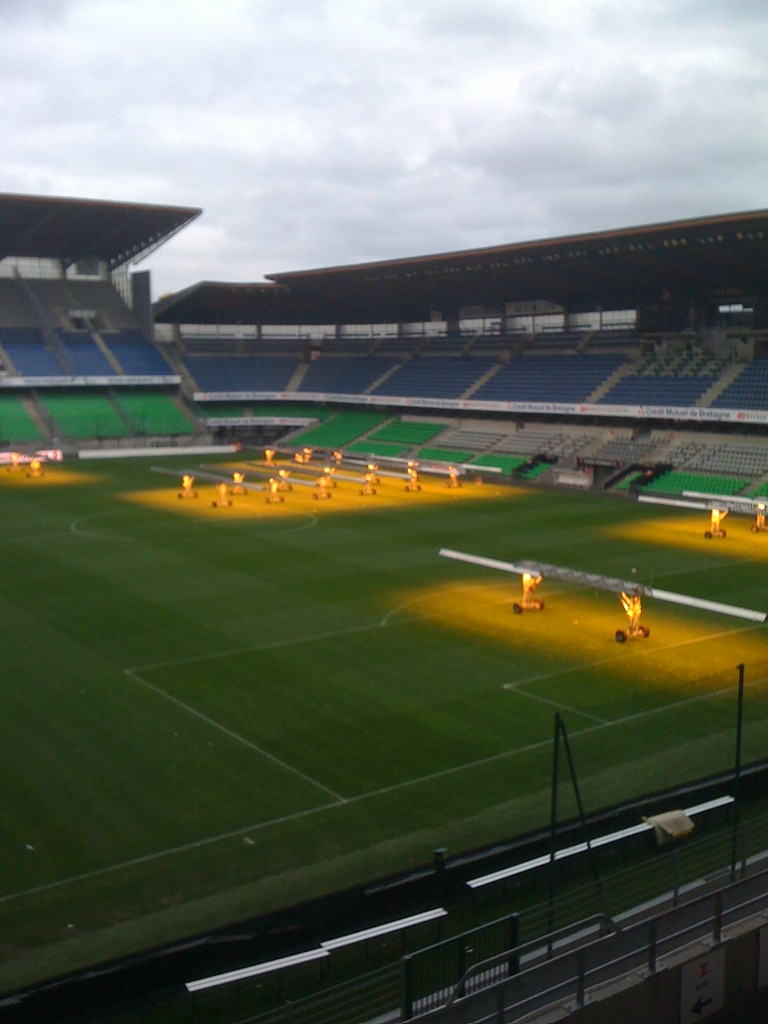 Lampes à sodium servant à entretenir le gazon du stade de la route de Lorient à Rennes